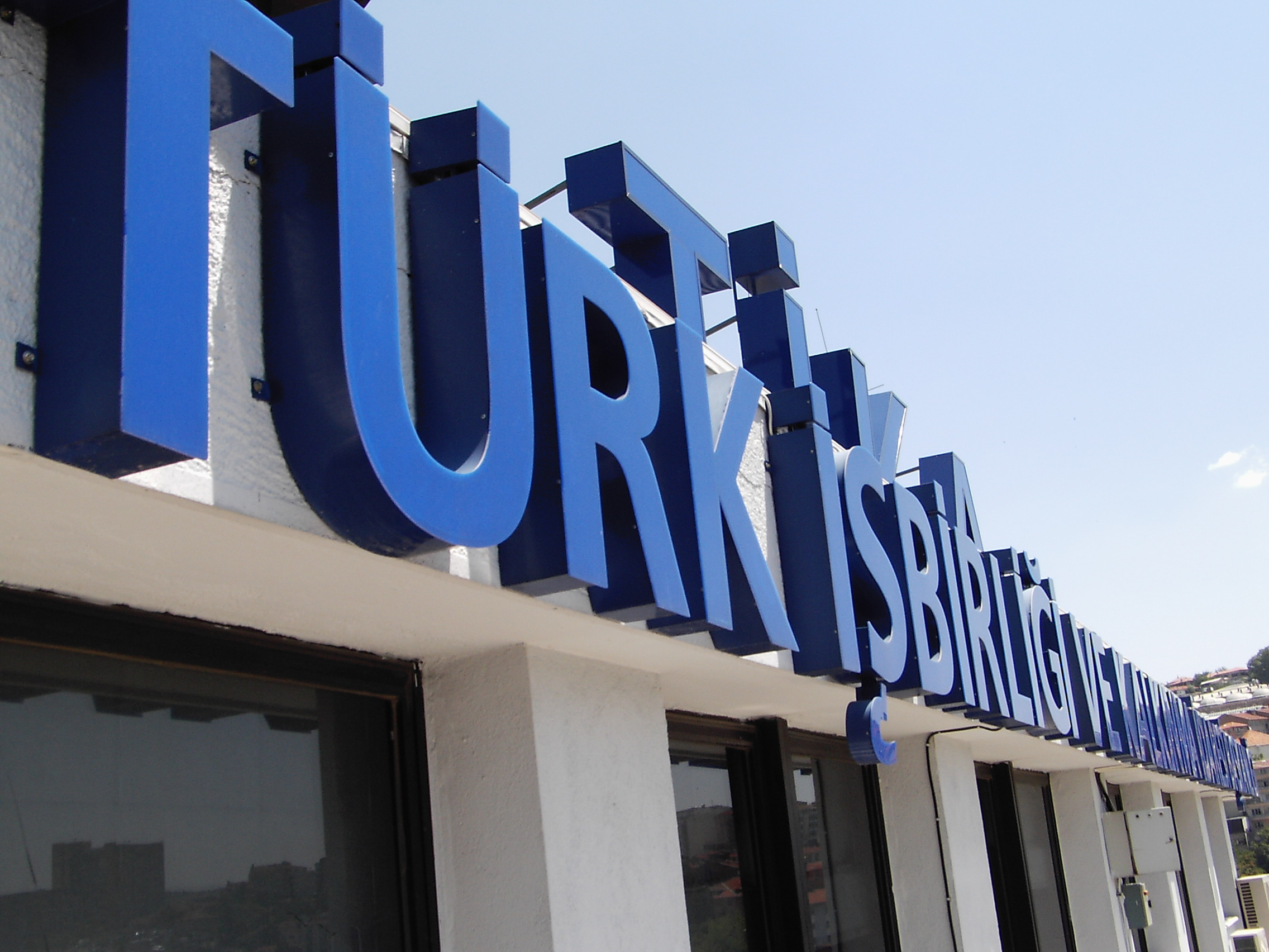 Fotoğrafı ben çektim.